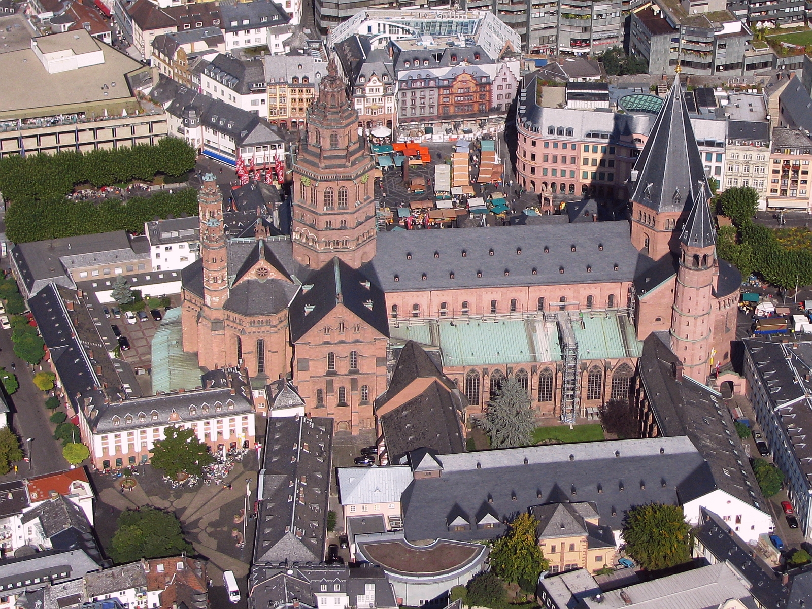 Mainz Luftbild Mainzer Dom - der bischöfliche Hohe Dom zu Mainz am Höfchen